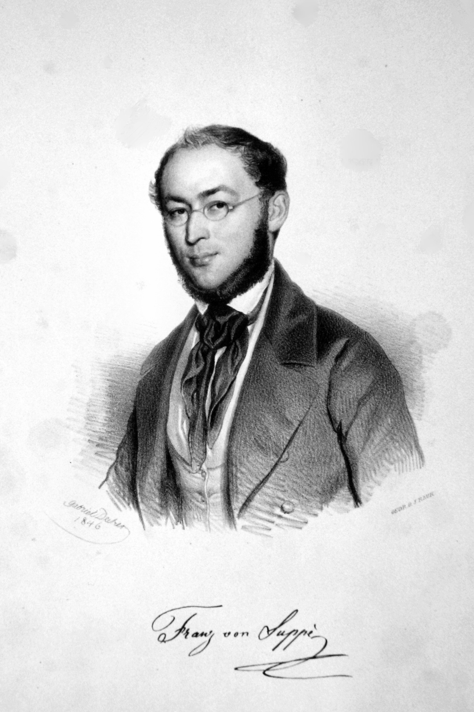 Franz von Suppé (1819-1895), österreichischer Komponist. Lithographie von Gabriel Decker, 1846